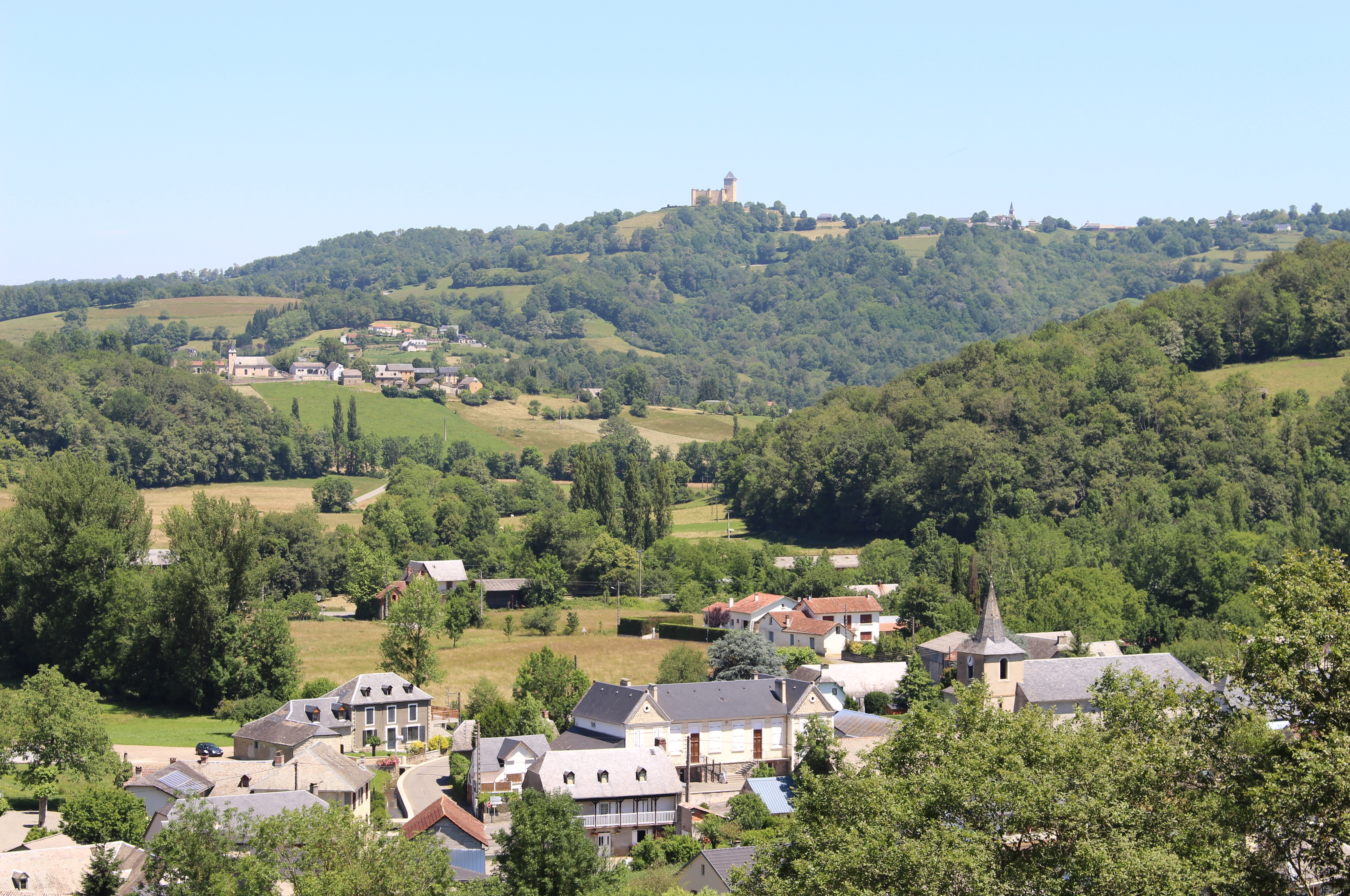 Bourg-de-Bigorre (Hautes-Pyrénées)